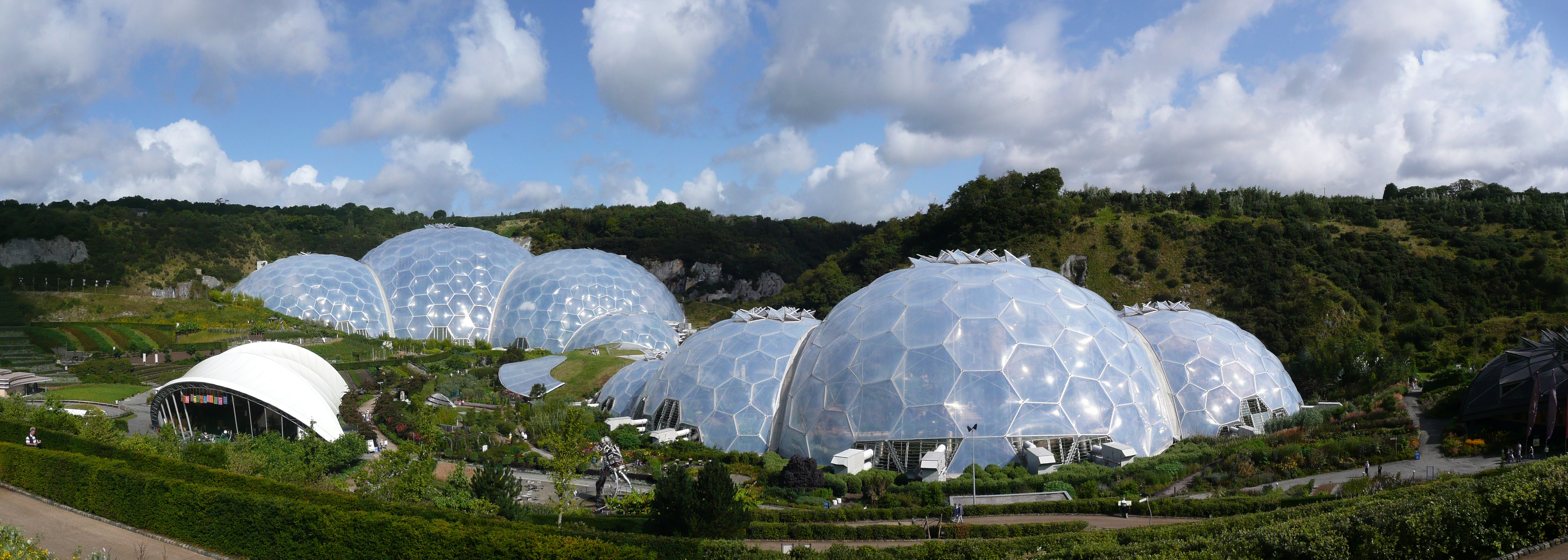 Panorama der geodätischen Kuppeln des Eden Project in Cornwall